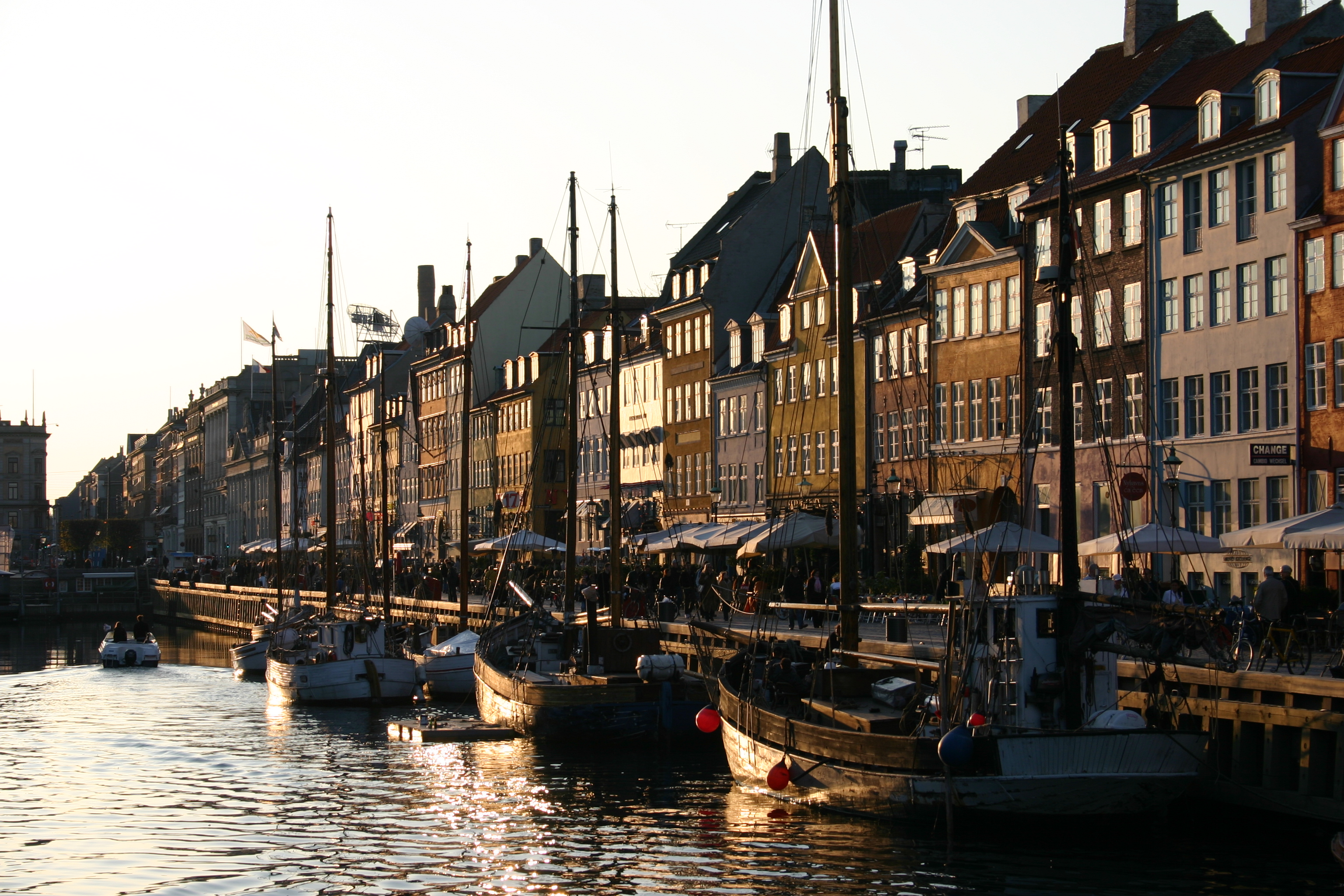 Nyhavn, Copenhagen, Denmark. Photo by Bertil Videt 2005.